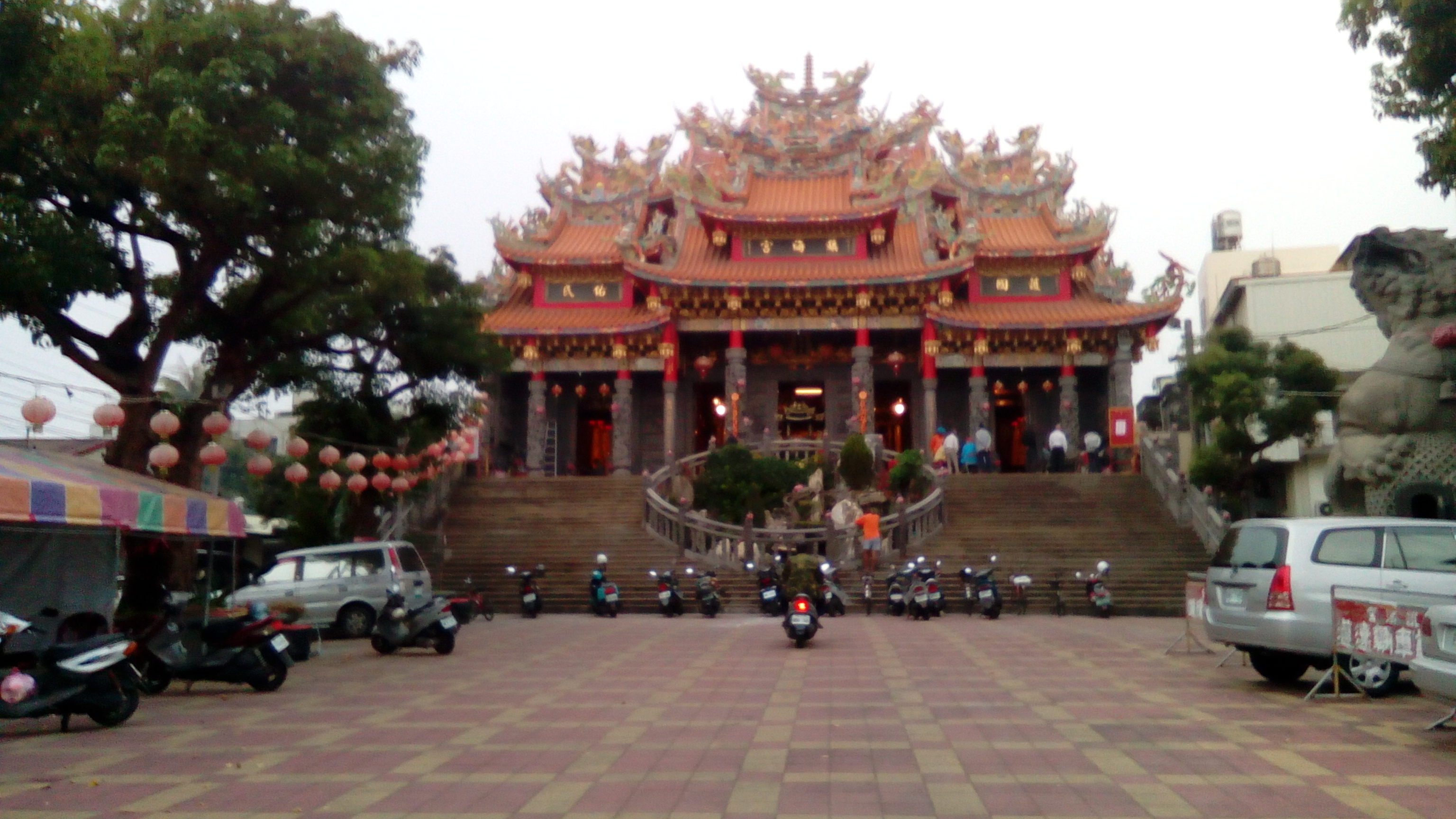 位於鎮海公園前 主祀蘇府七代巡